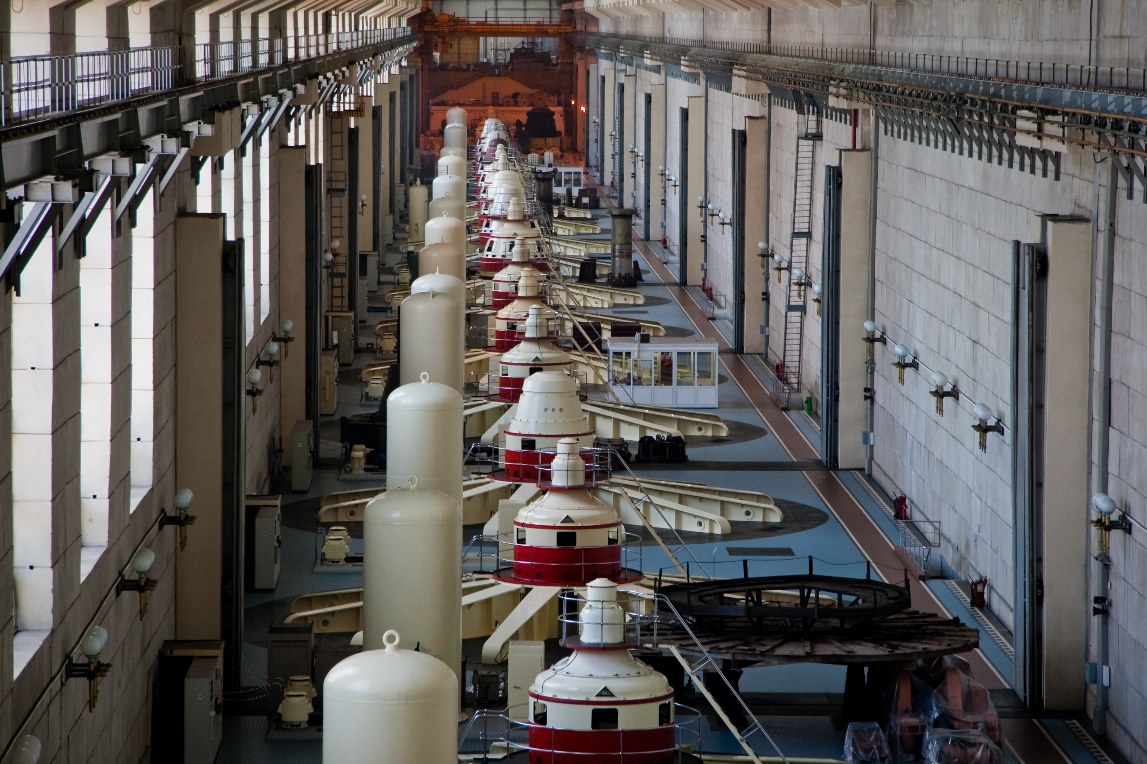 Машинный зал. Жигулёвская ГЭС. Жигулёвск-Тольятти. Россия